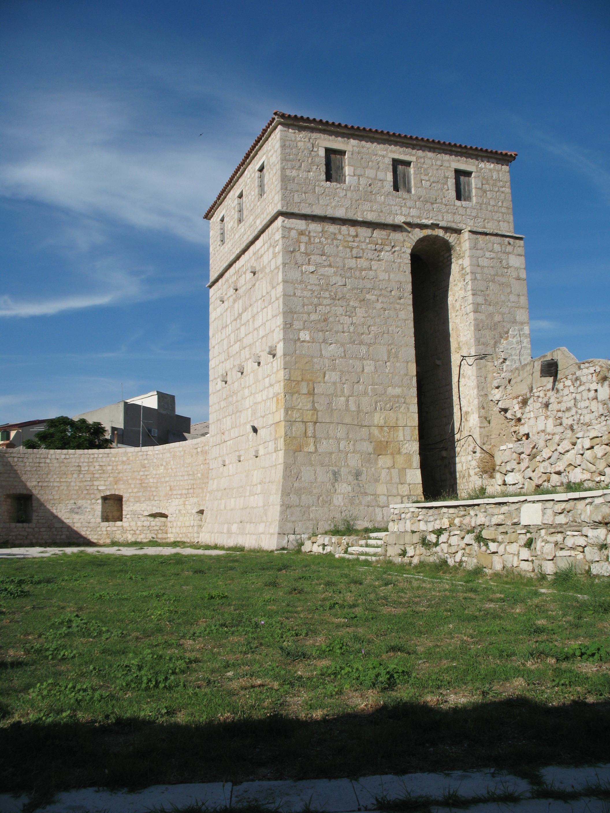 Pag város